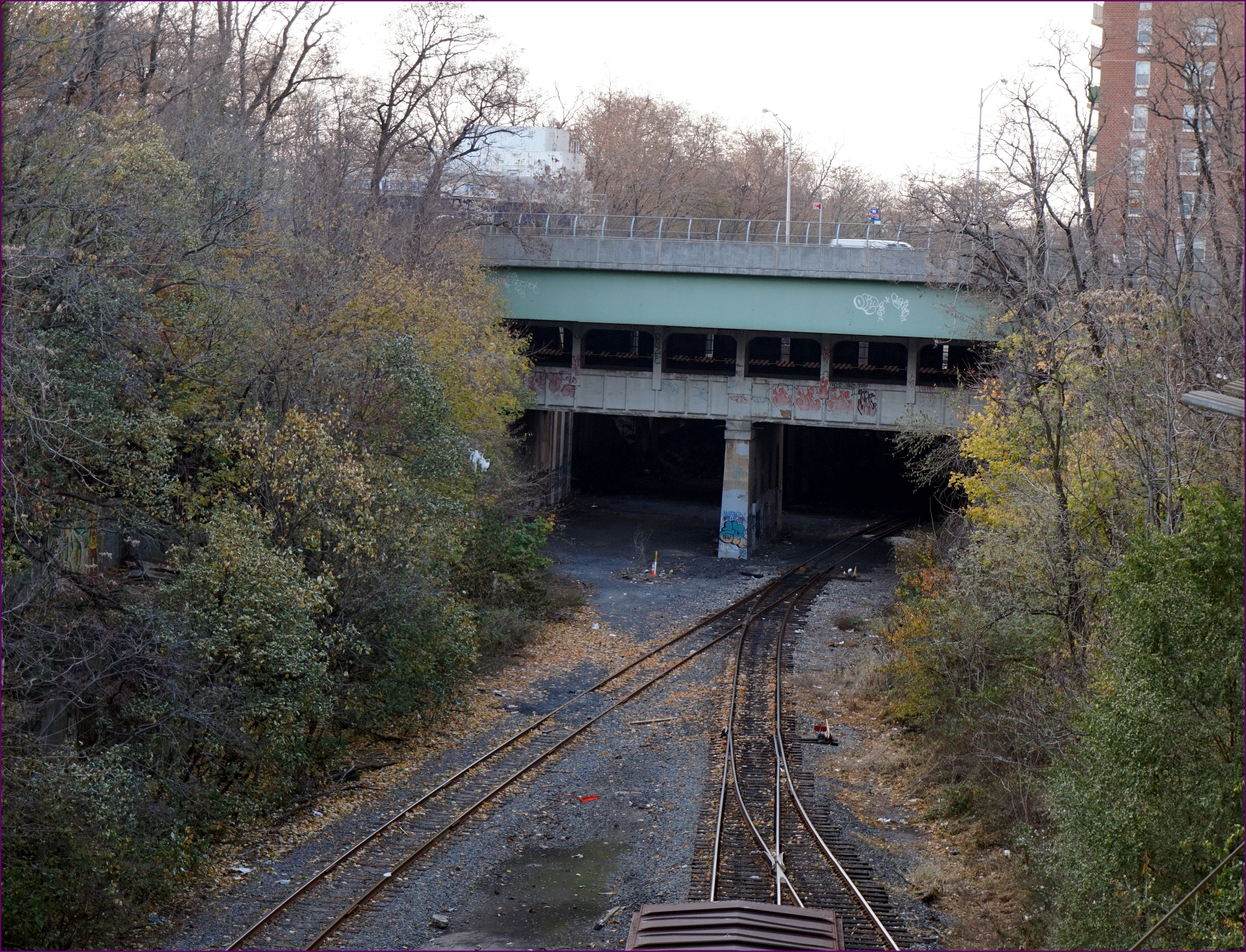 Bay Ridge